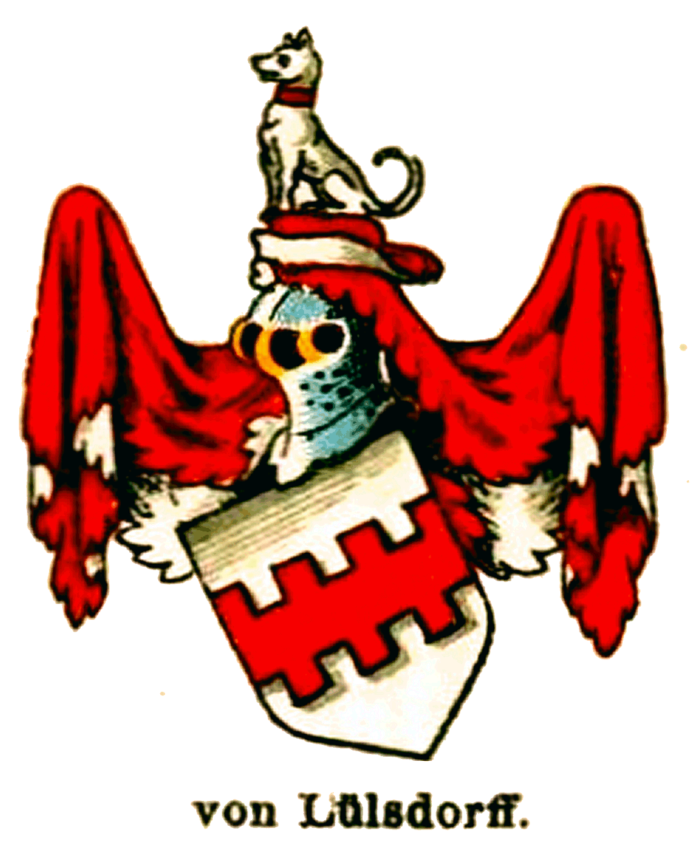 Wappen derer von Lülsdorf